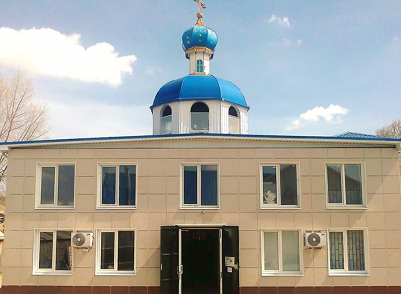 Свято-Покровский храм, расположенный в г. Белореченск Краснодарского края